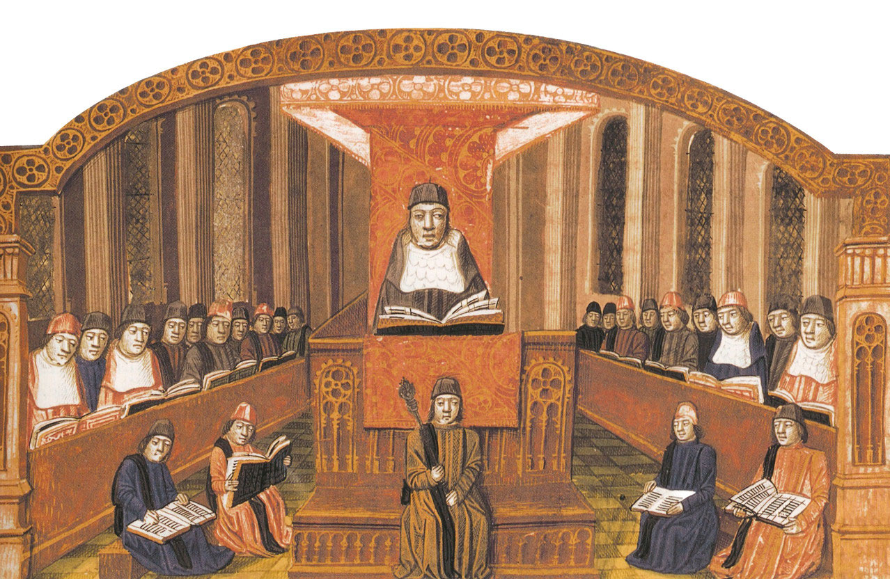 Cours de théologie à la Sorbonne. Enluminure de la fin du XVe siècle, Bibliothèque de Troyes.